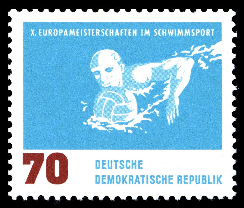 Ausgabepreis: Pfennig First Day of Issue / Erstausgabetag: Auflage: Entwurf: Druckverfahren: Michel-Katalog-Nr: Ländercode-MiNr